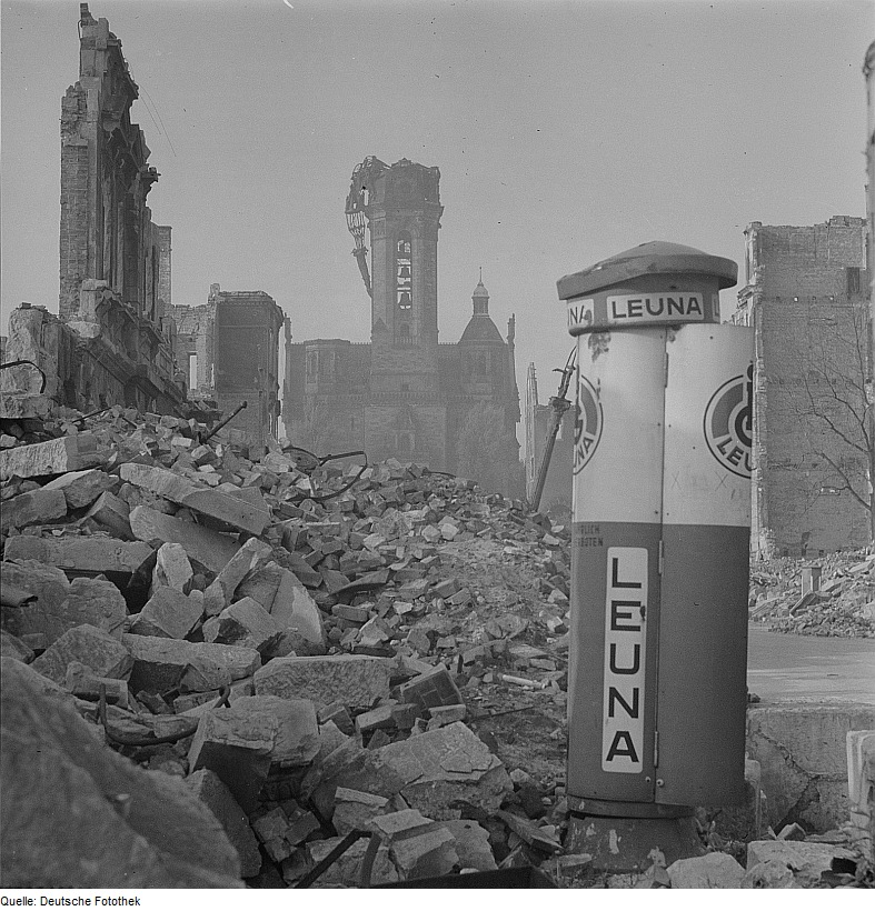 Original image description from the Deutsche FotothekBlick über einen Trümmerschuttberg gegen die Ruine der Lukaskirche